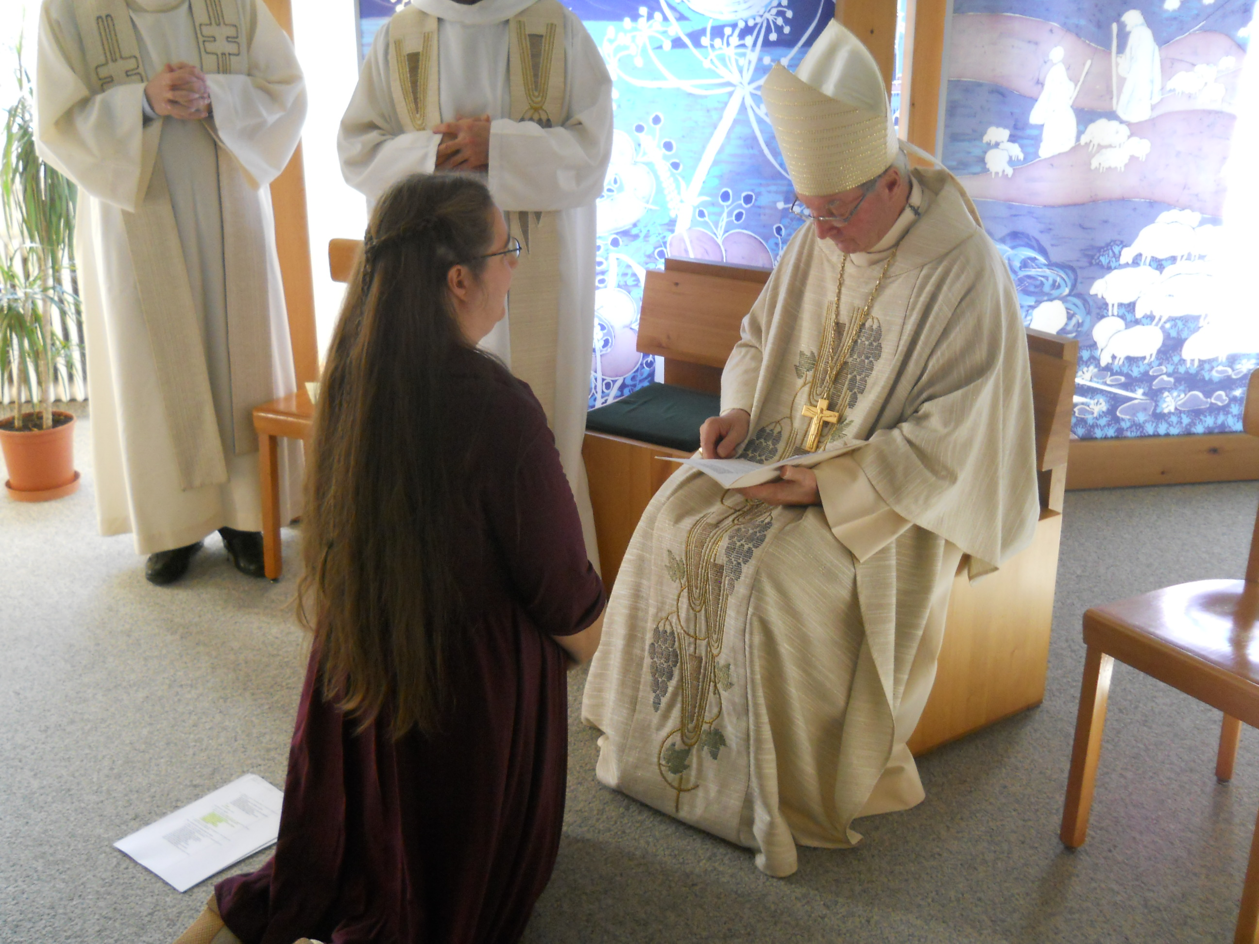 Tapisserie christologique église Saint-Victor d'Ollon